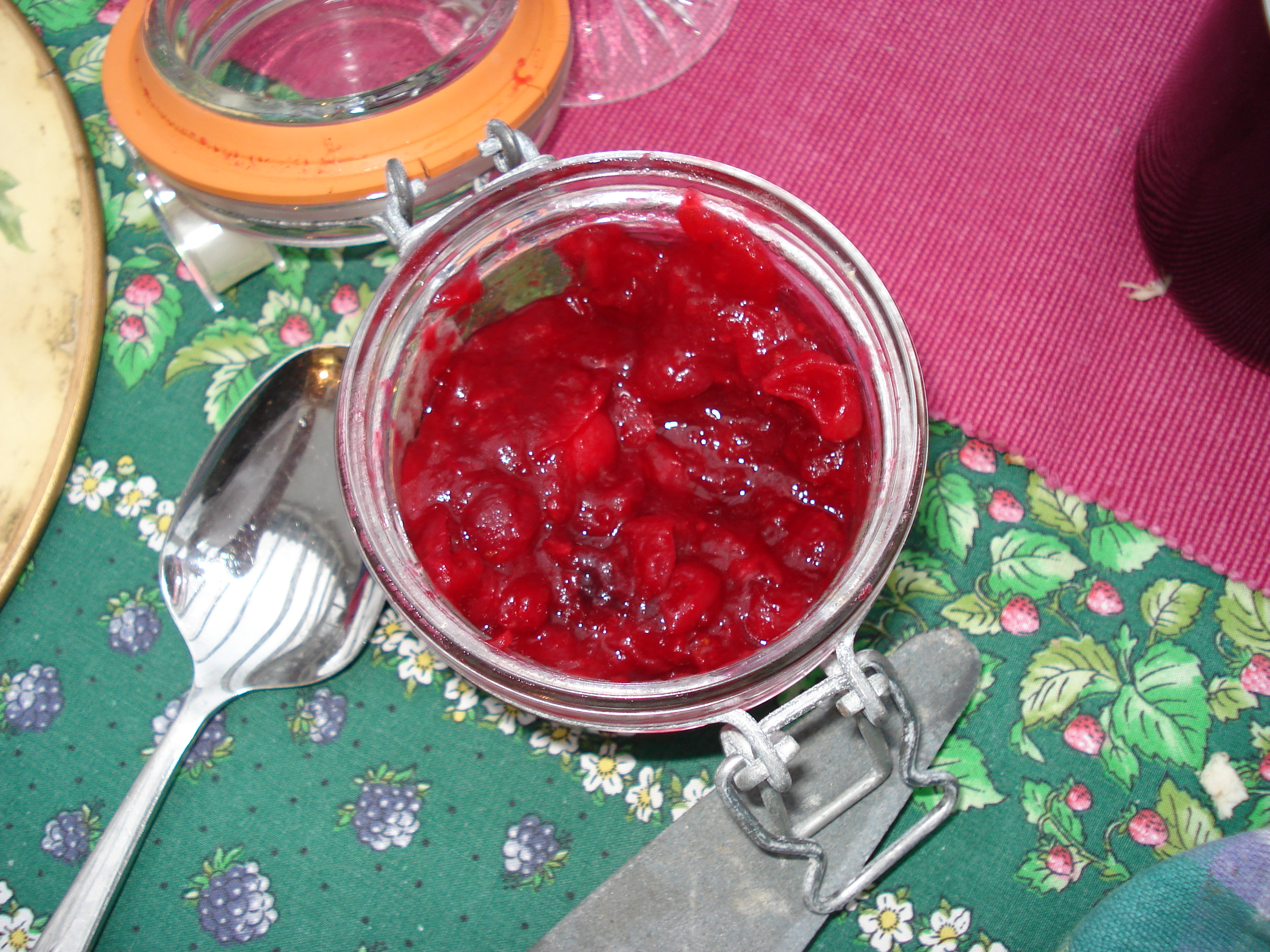 רוטב חמוציות ביתי.